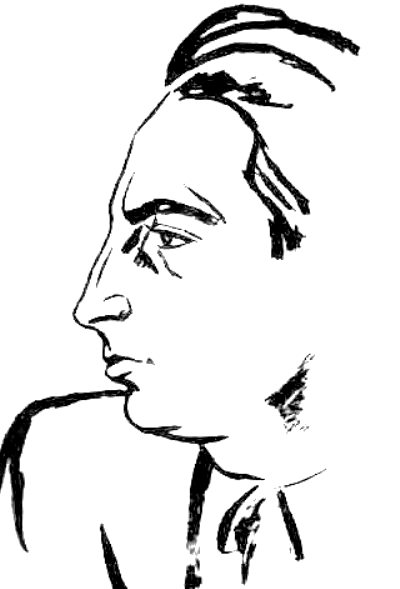 Ştefan Dimitrescu - Portretul lui George Călinescu, tuş cu pensula pe hârtie de desen, 1929, Academia Română, Bucureşti